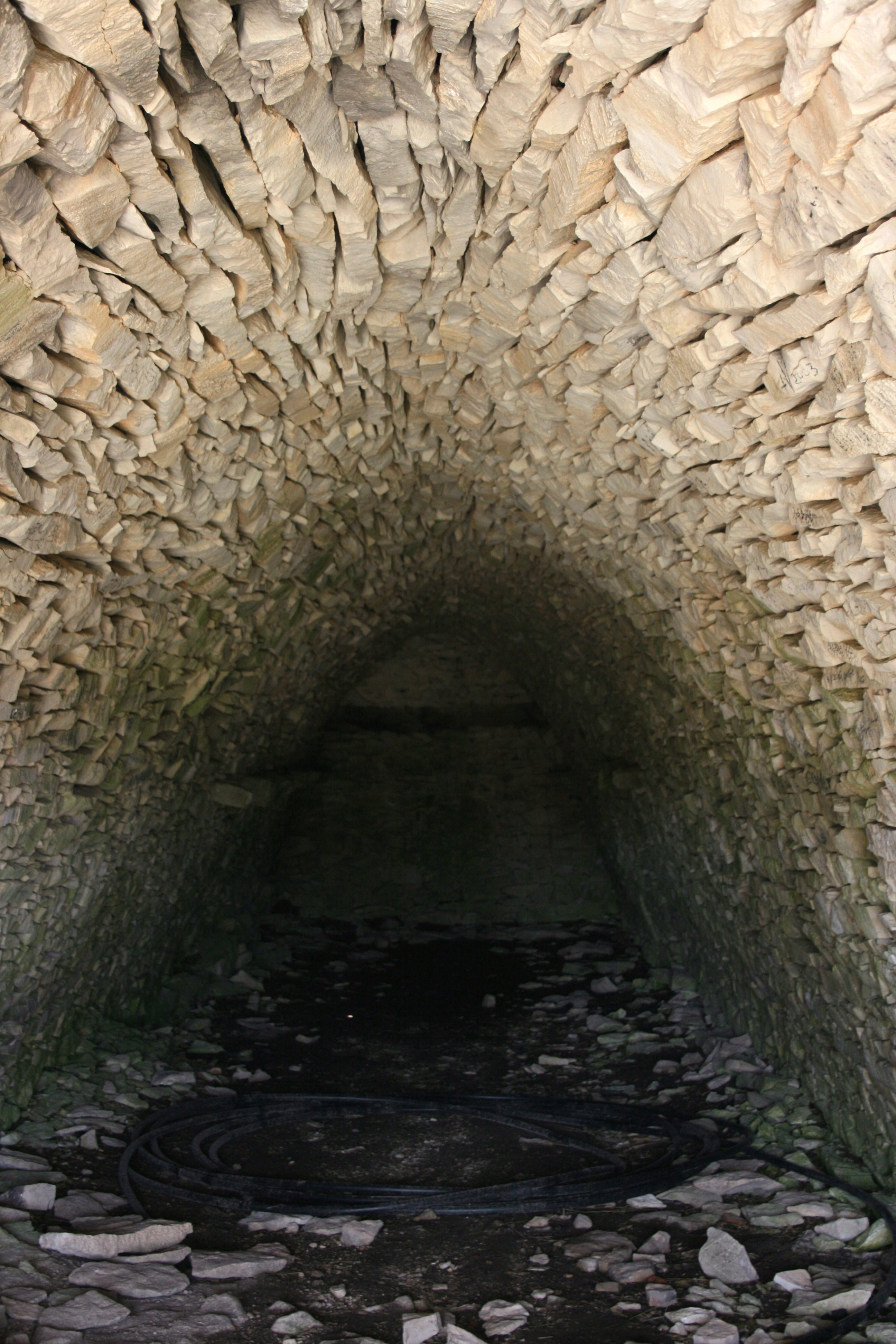 Le Contadour, commune de Redortiers, département des Alpes-de-Haute-Provence (France). Jas (bergerie) des Fraches. Intérieur : voûte clavée.